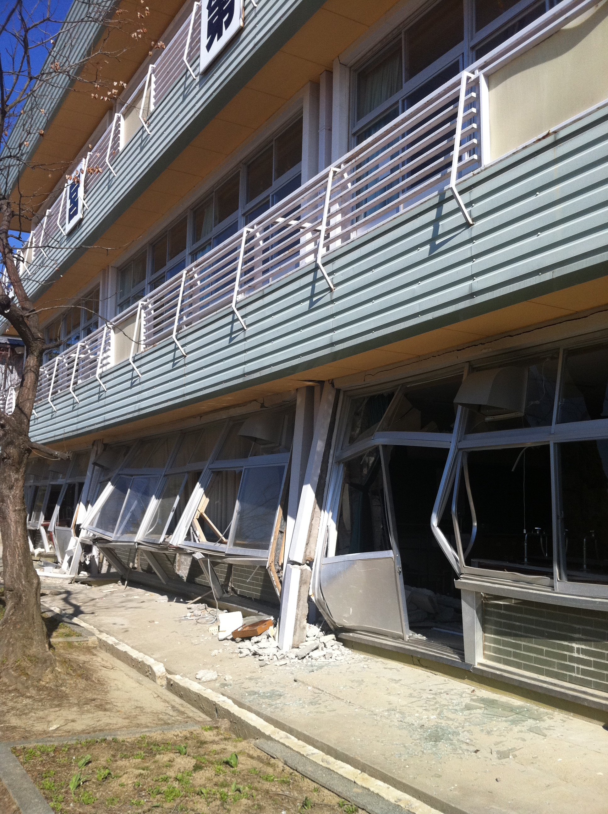 東日本大震災で被災した校舎